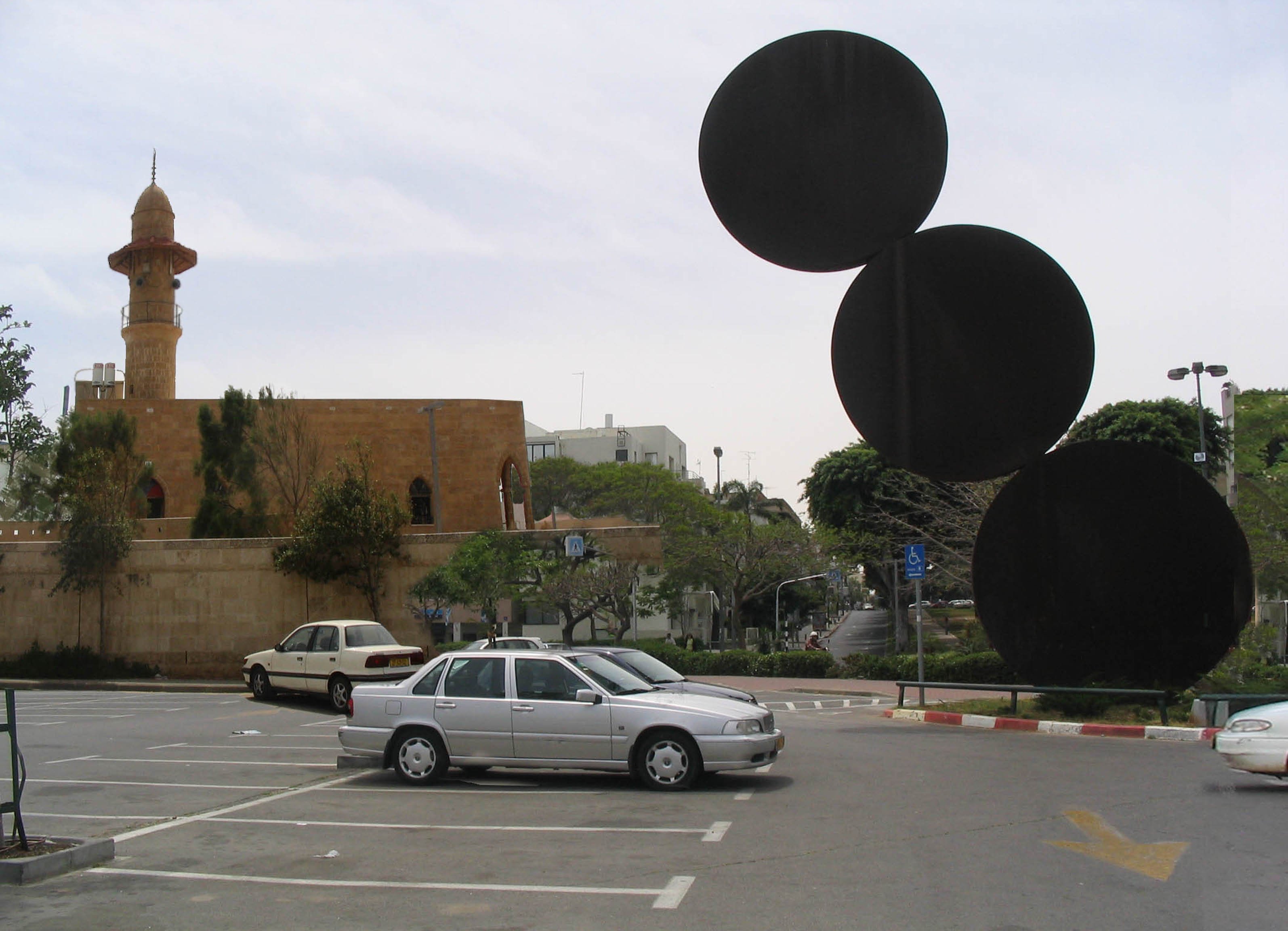 מסגדים בתל אביב, 2008, קולז´ דיגיטלי, מסגד בכיכר הבימה מול הפסל התרוממות של קדישמן, עבודה של אורה ראובן, Ora Ruven art